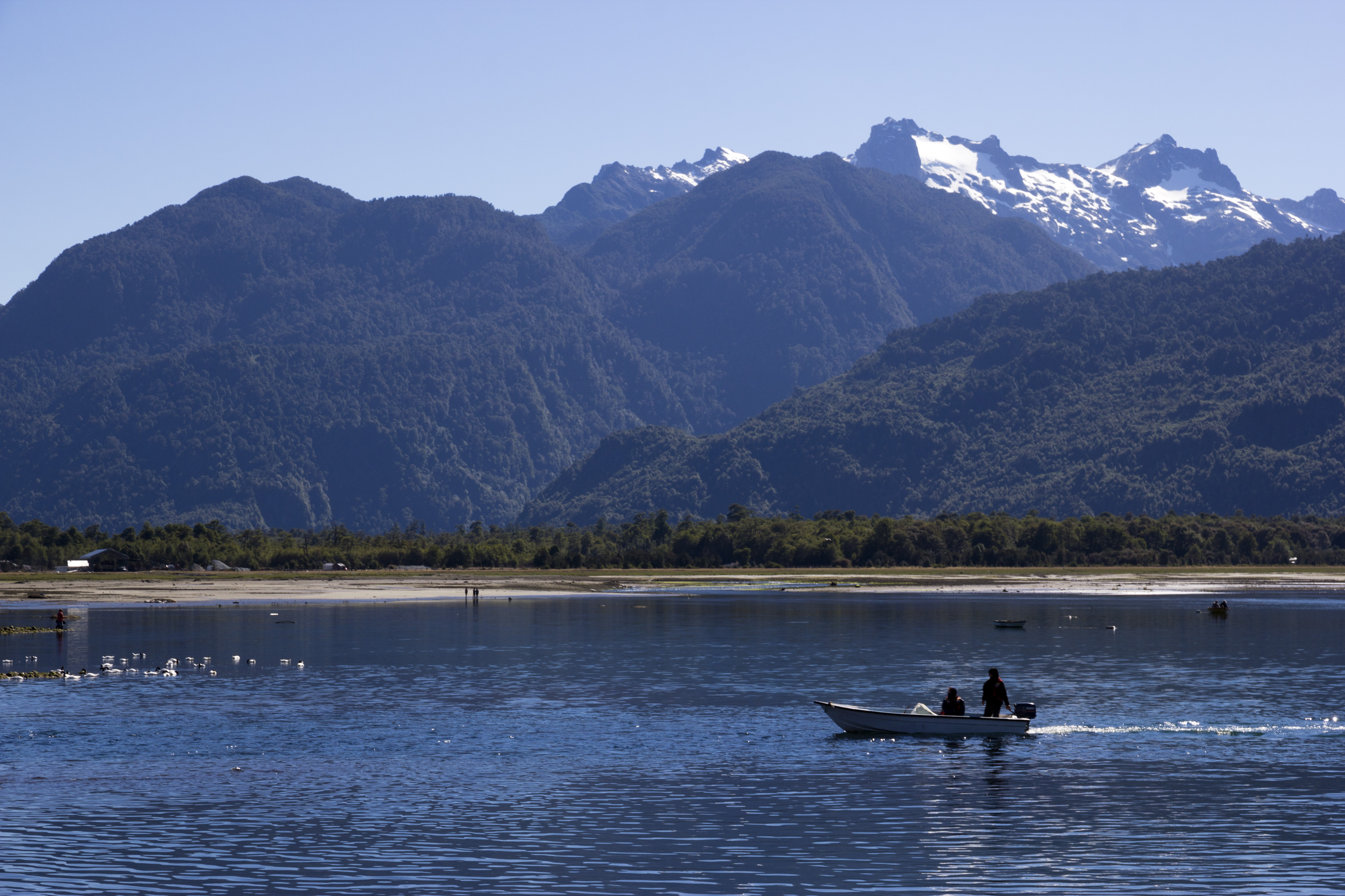 comuna de hualaihué